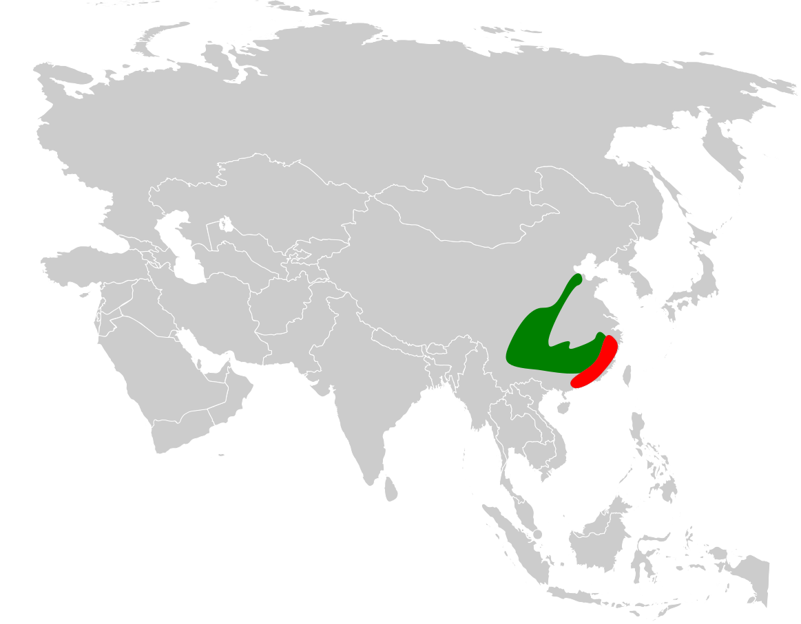 Periparus venustulus distribution map